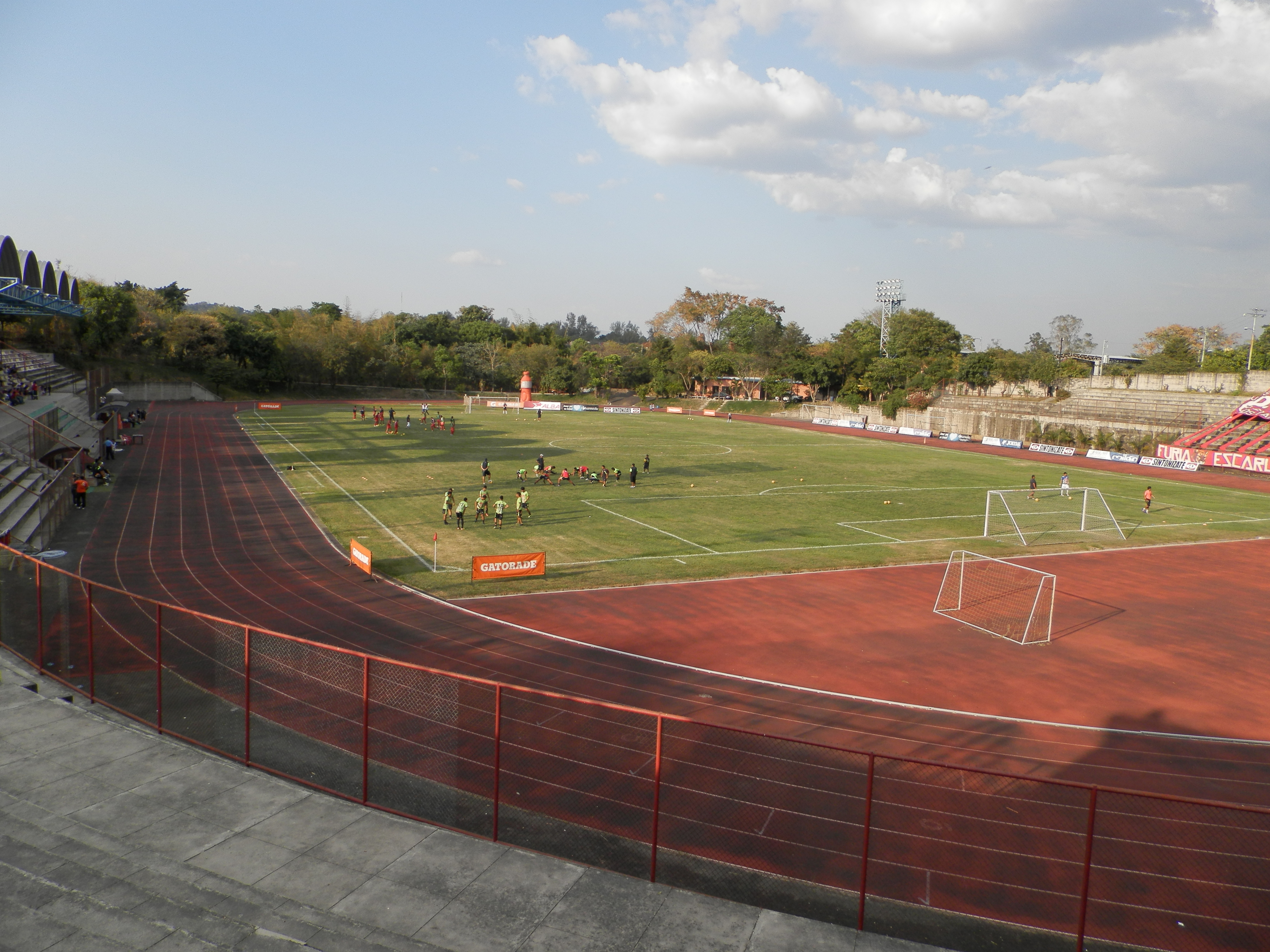 Estadio Universitario (UES)